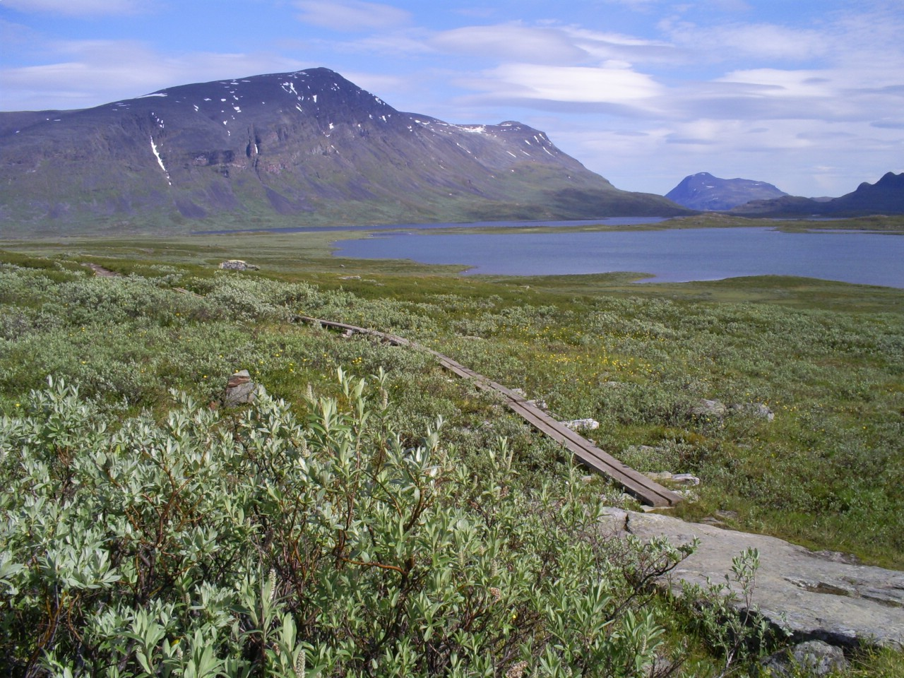 Miesakjávri lake along Kungsleden